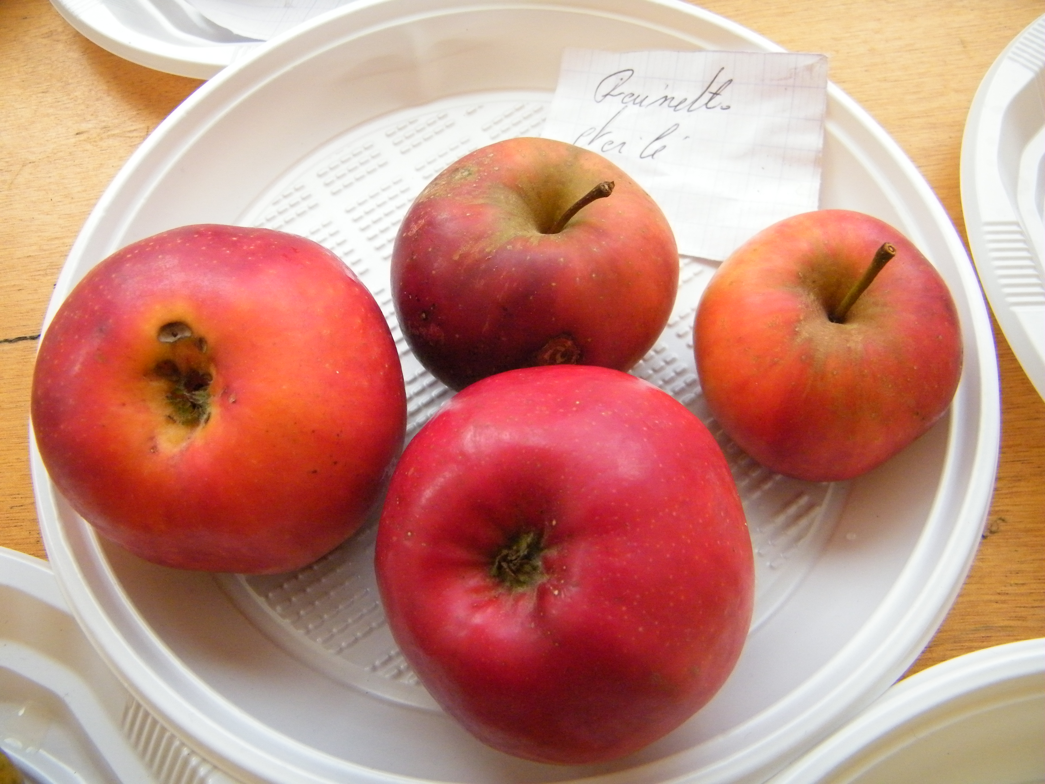 Reinette étoilée, Mons-Boubert, Somme, Fr, expo du 29-10-2017 (34)